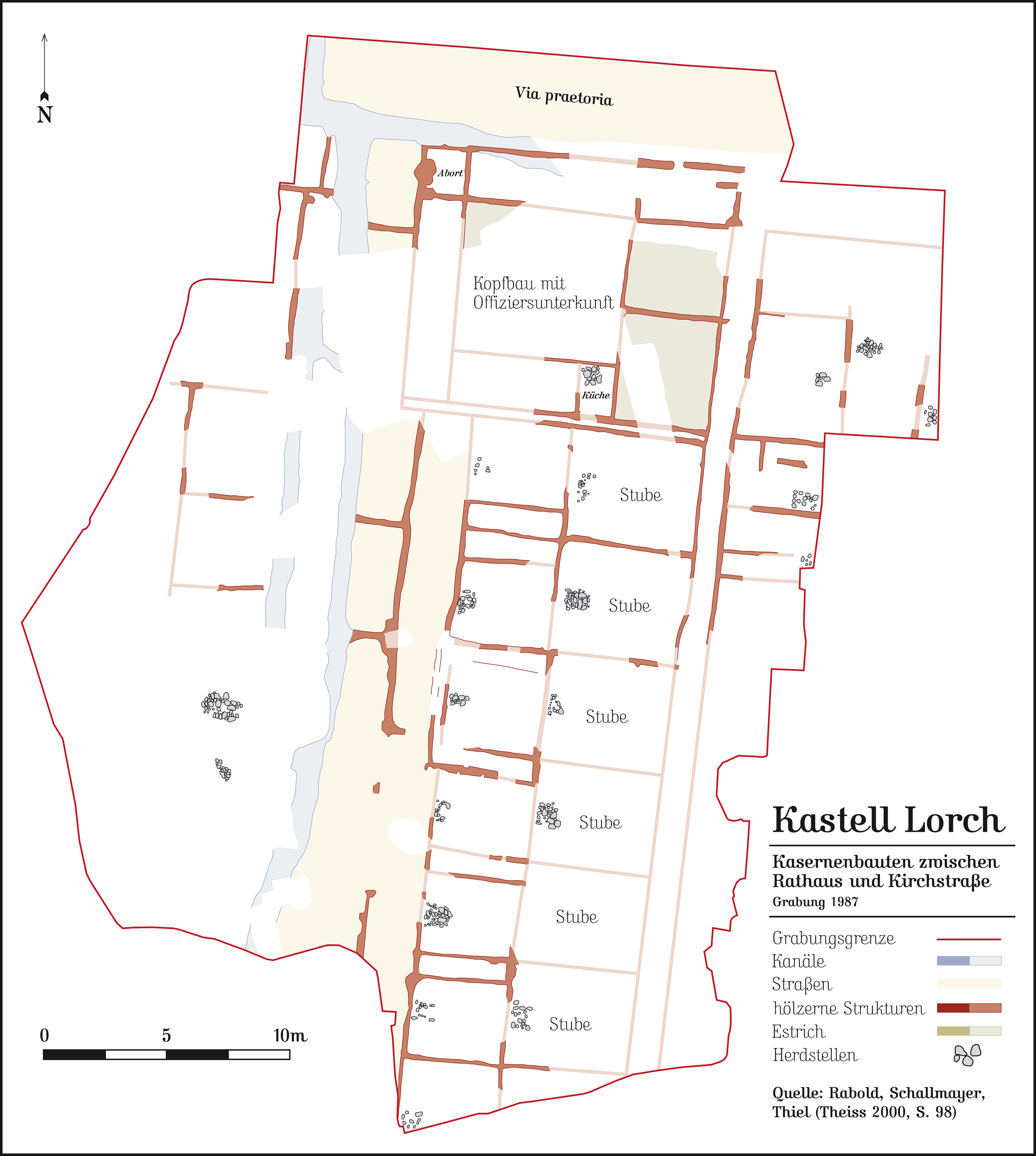 Die 1987 ergrabenen Kasernenbauten im Limeskastell Lorch im Remstal. Hergestellt am Macintosh unter Macromedia Freehand MX; abgespeichert für Wikipedia unter Adobe Photoshop CS 2.